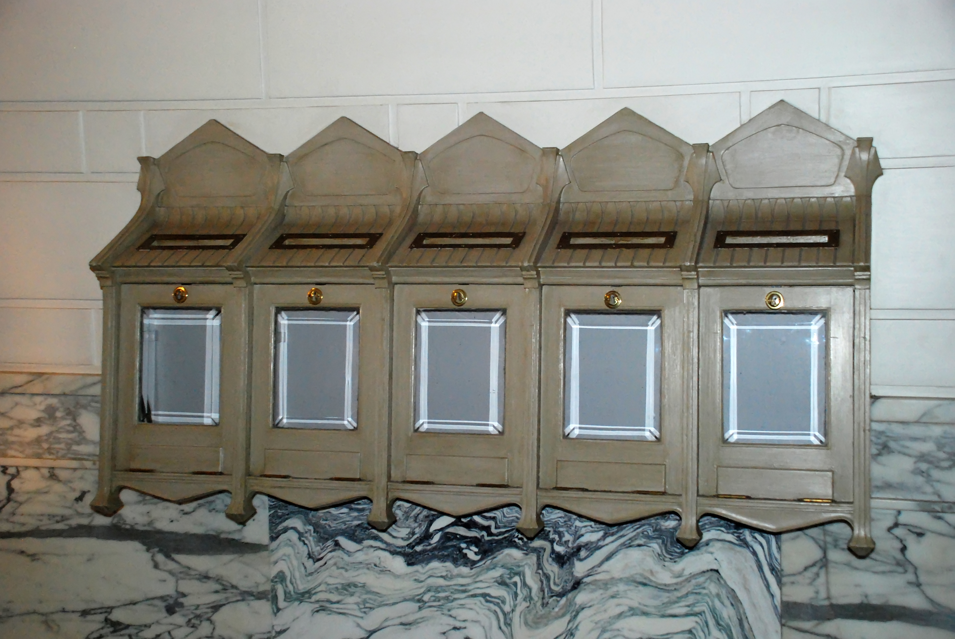 Belgique - Bruxelles - Hôtel Gresham